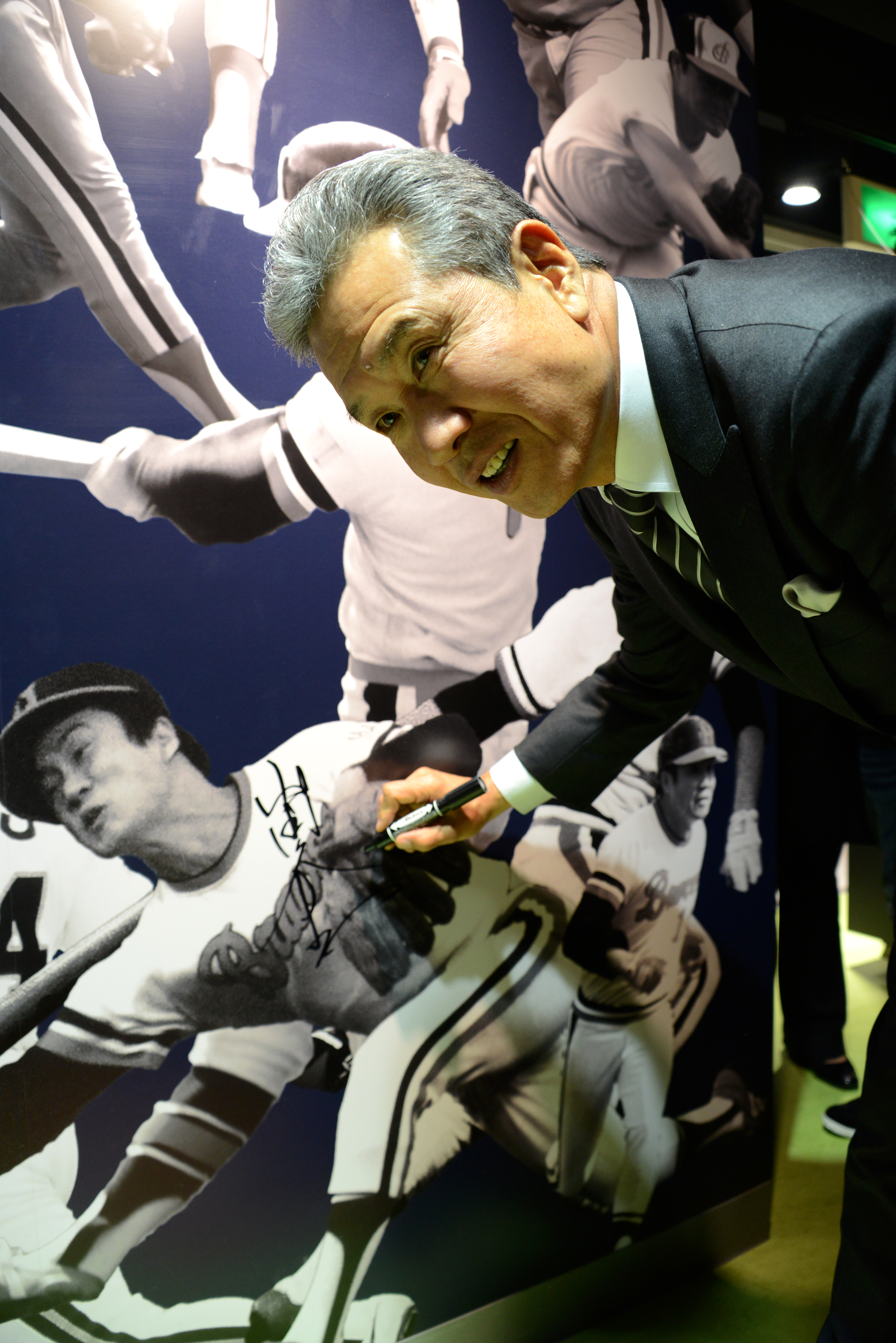 BsSQUAREオープニングセレモニーでの山田久志氏（2014年）